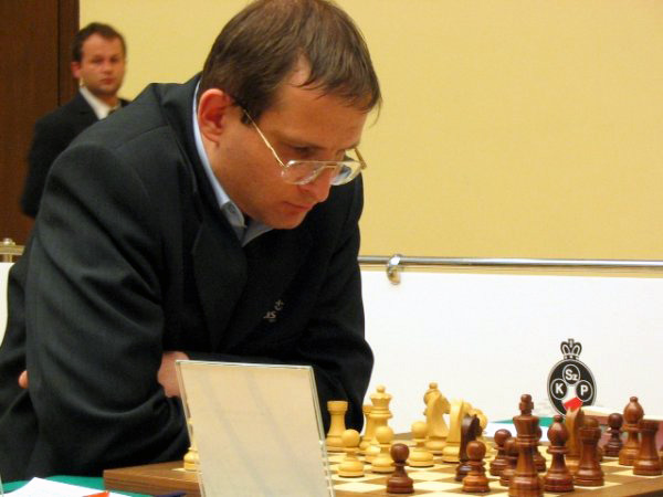 Michał Krasenkow, Warsaw 2004